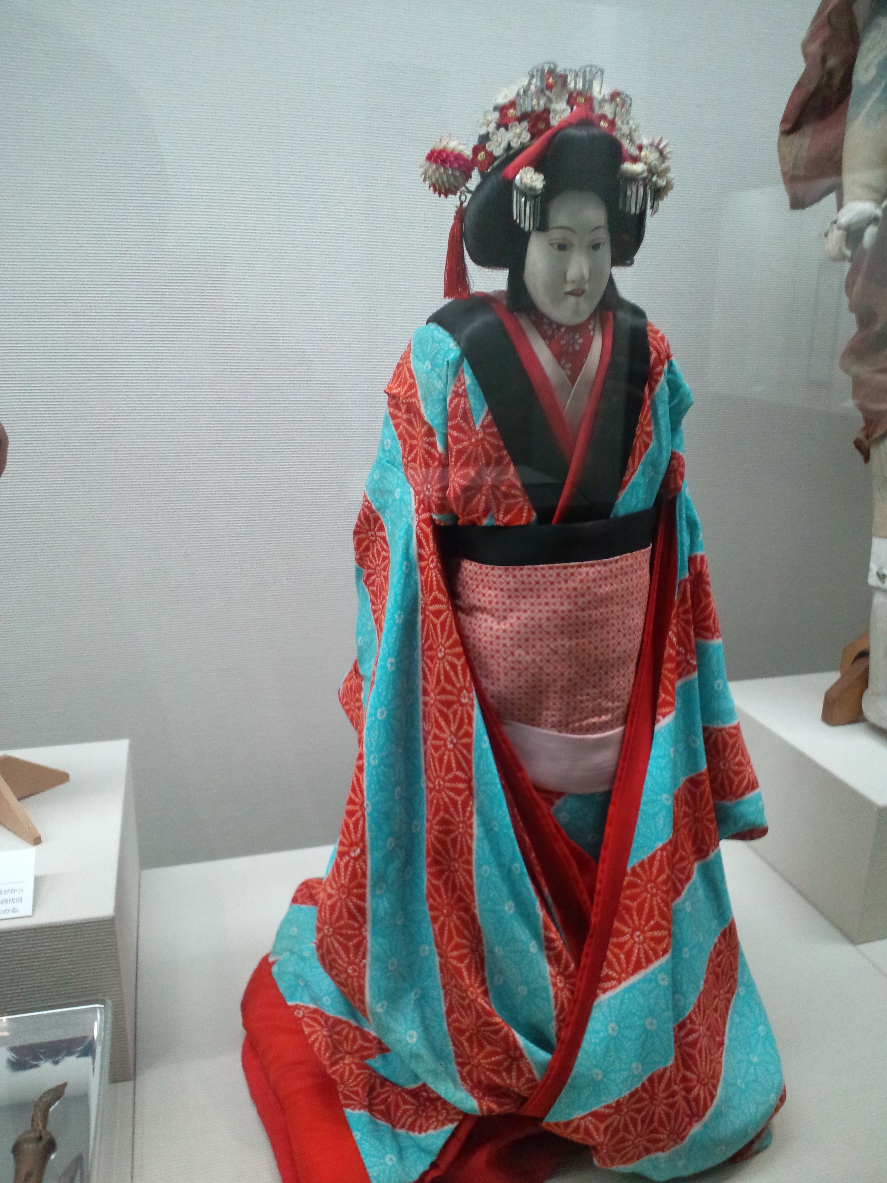 大阪歴史博物館 浄瑠璃人形